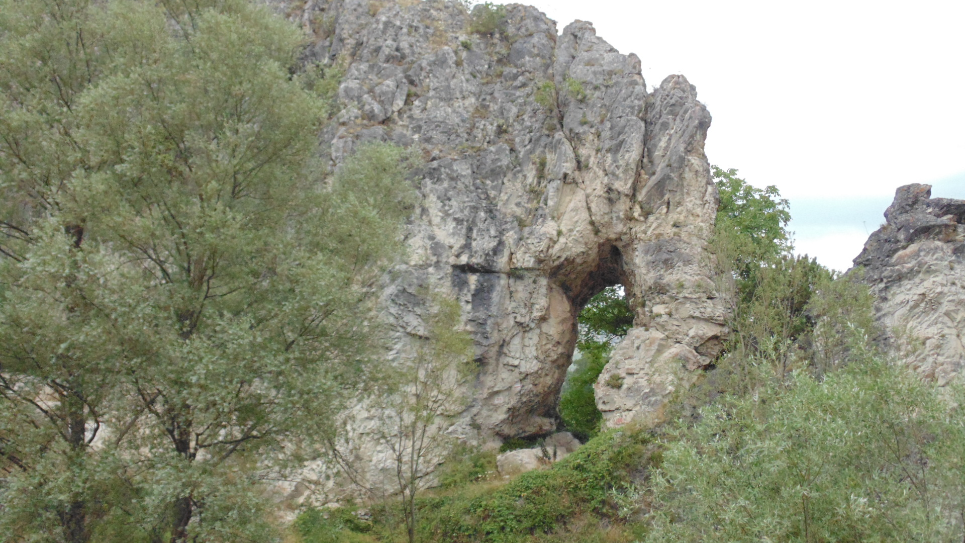 Слонът